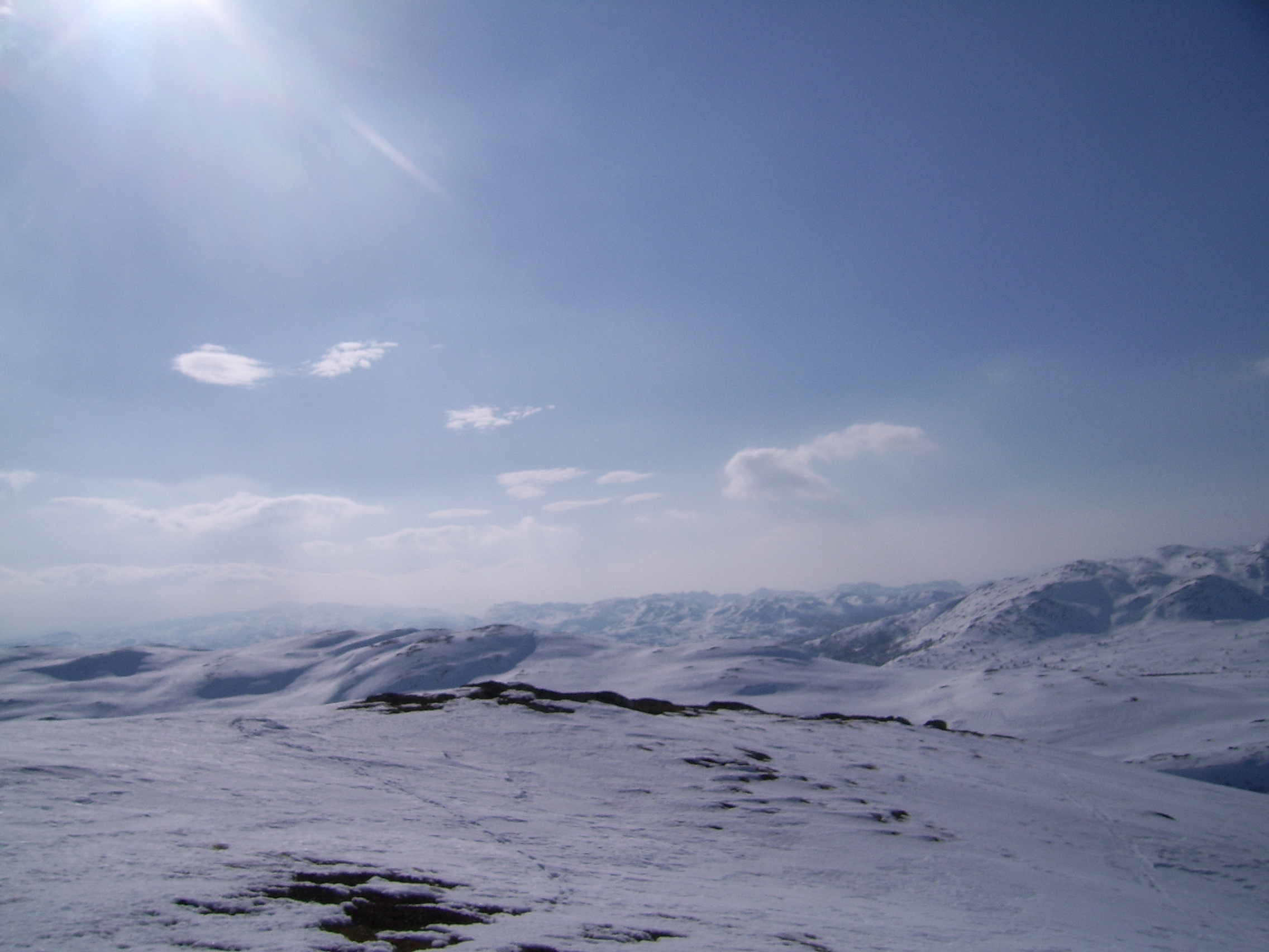 Utsikt Brattfjell mot Svinefjell